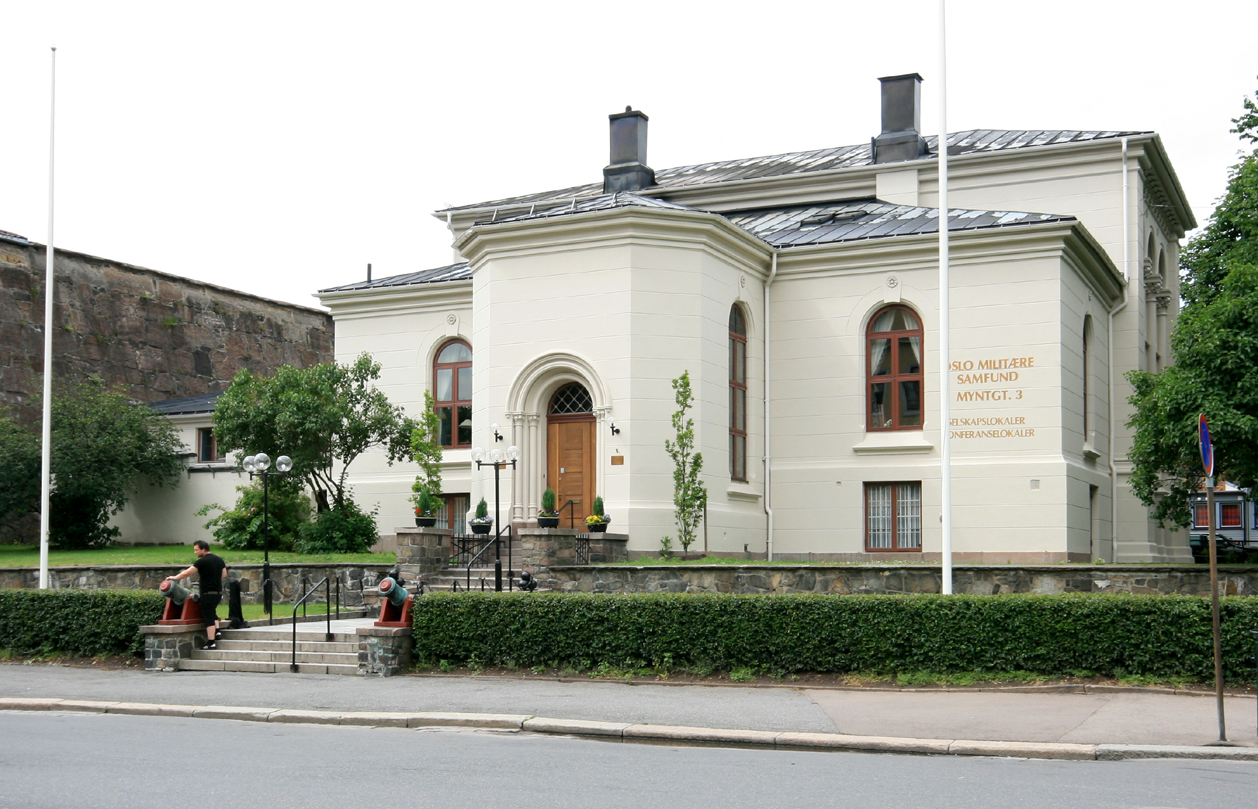 Oslo Militære Samfunn, Myntgata 3, Oslo. Built 1876. Architect: Wilhelm von Hanno. Seen from Kongens gate.